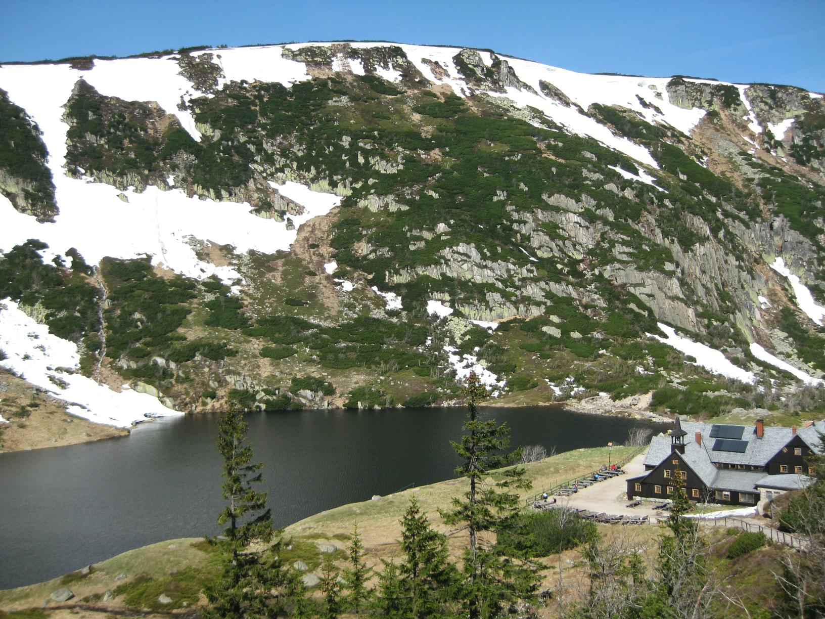 Kocioł Małego stawy i schronisko "Samotnia" w Karkonoszach